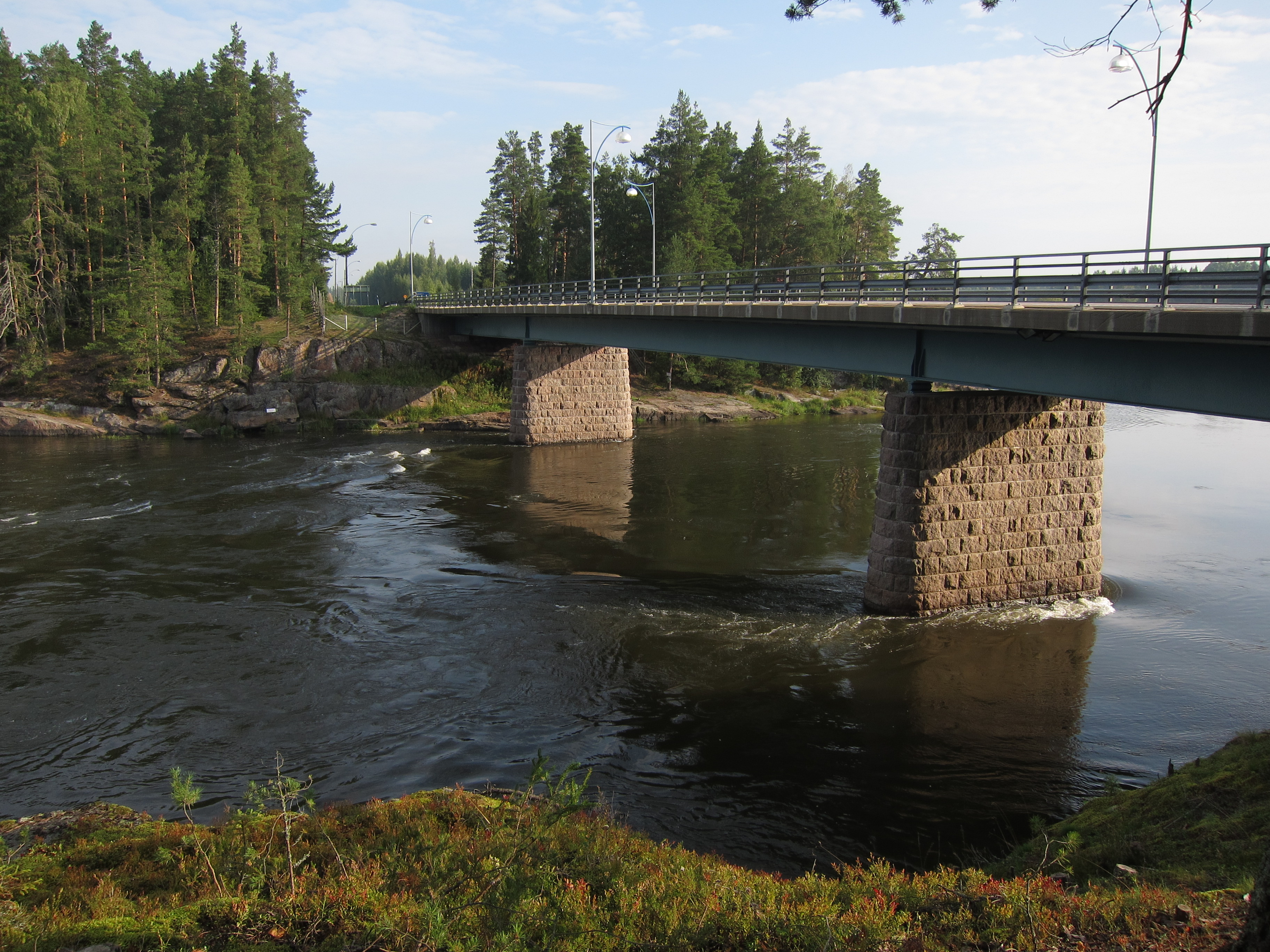 Susikoski ja Susikosken silta Kymijoessa Kotkan ja Kouvolan rajalla.